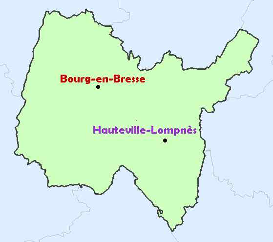 Carte de localisation d'Hauteville